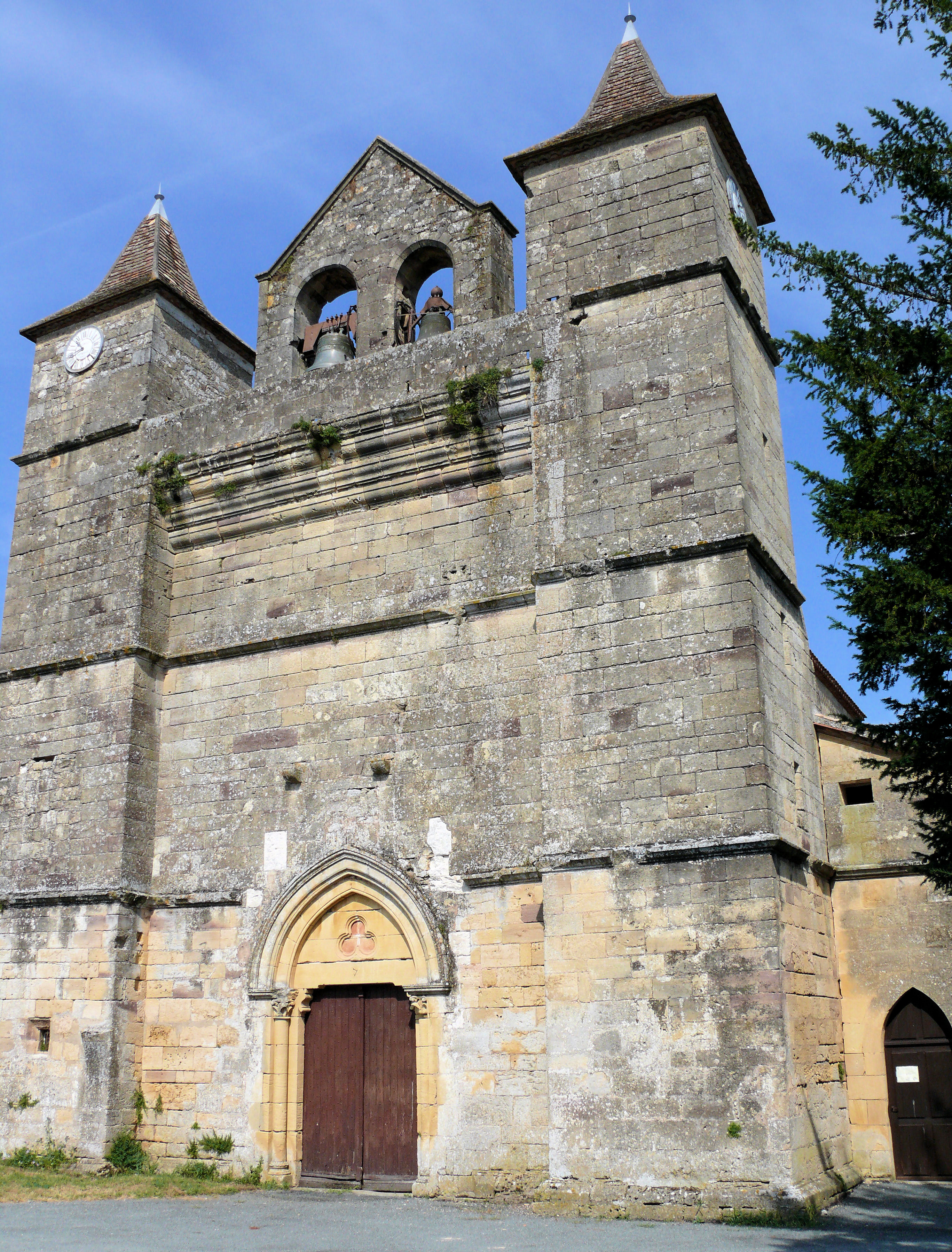 Montagnac-sur-Lède - Eglise Saint-Martin